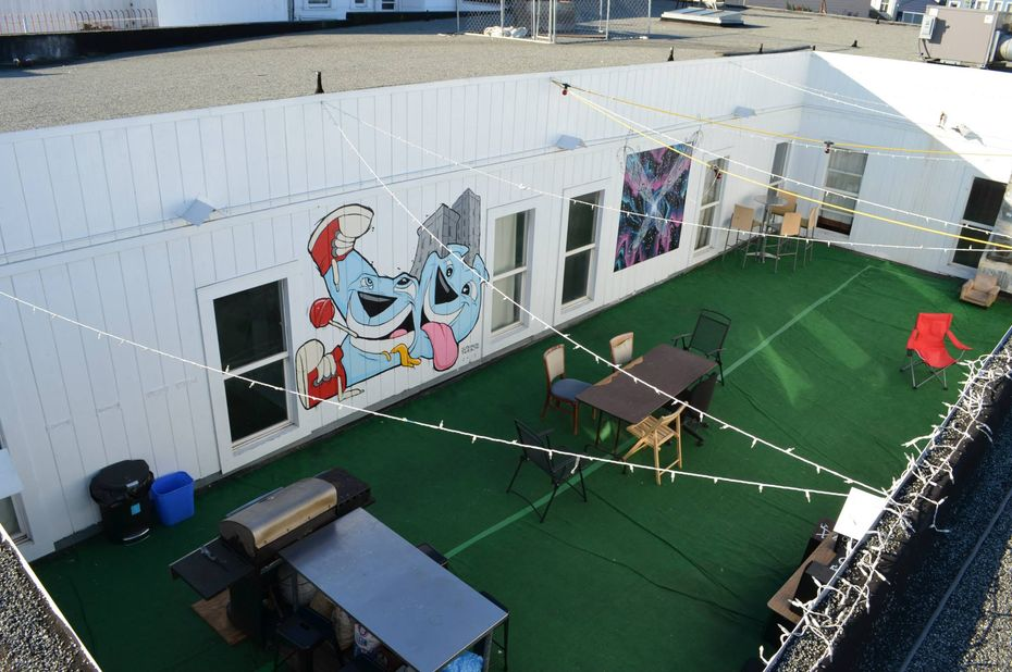 A l’intérieur des Hacker Houses : ces Européens qui veulent vivre le rêve américain de la Silicon Valley © 20mission